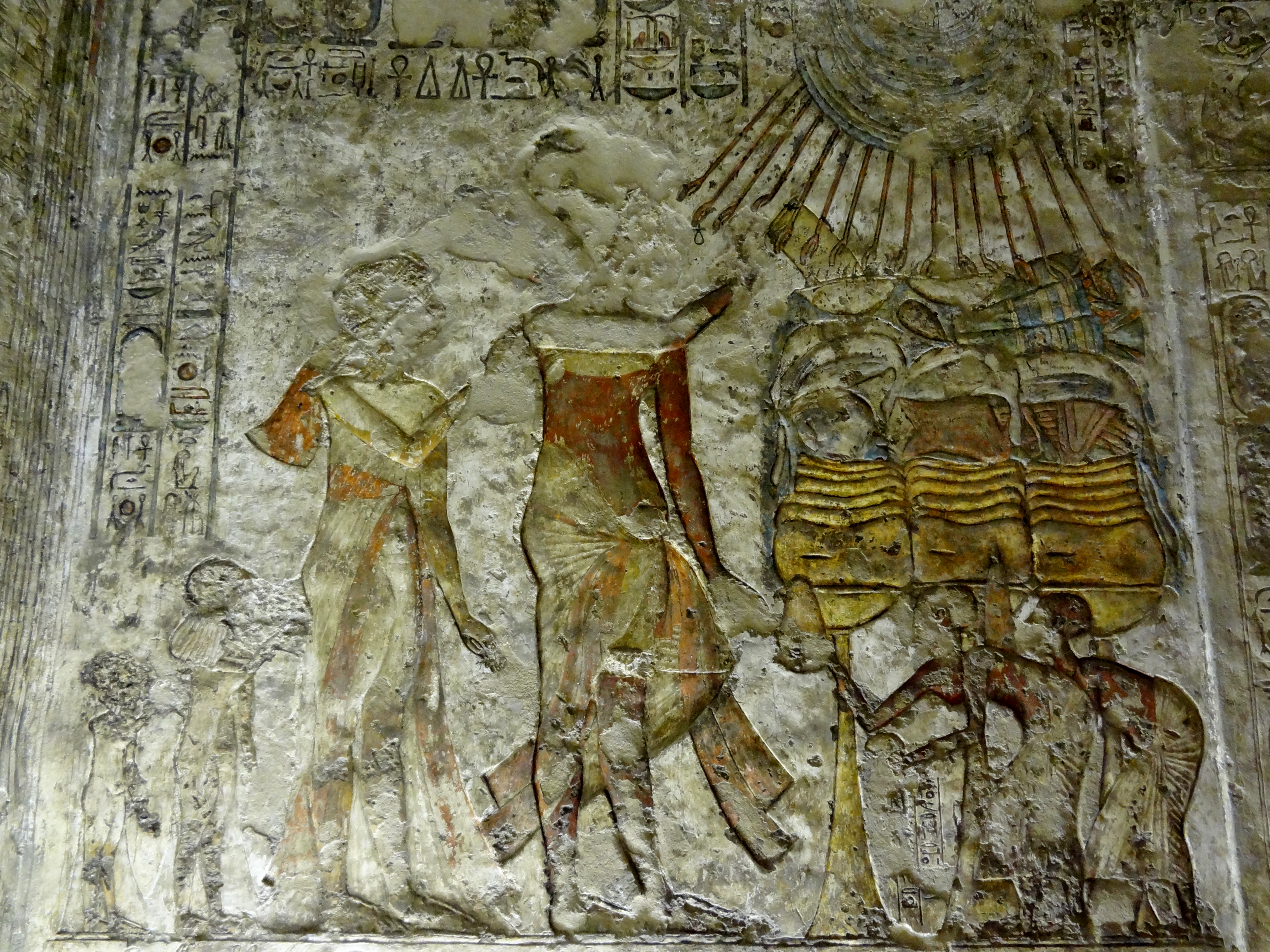 Grab des Merire I. (TA 4) in Tell el-Amarna, Ägypten